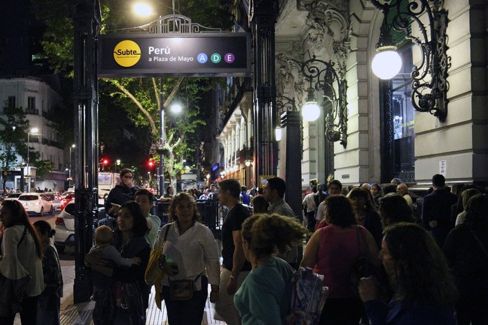 La entrada a la estación Perú de la Linea A del subte de Buenos Aires, durante el servicio turístico de los coches La Brugeoise